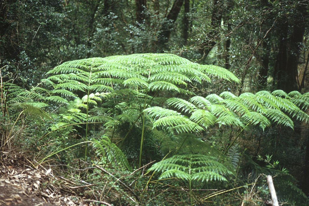 Lophosoria quadripinnata, Dicksoniaceae - Chile, Termas Aguas Calientes, Parque Nacional Puyehue (Prov. de Osorno)